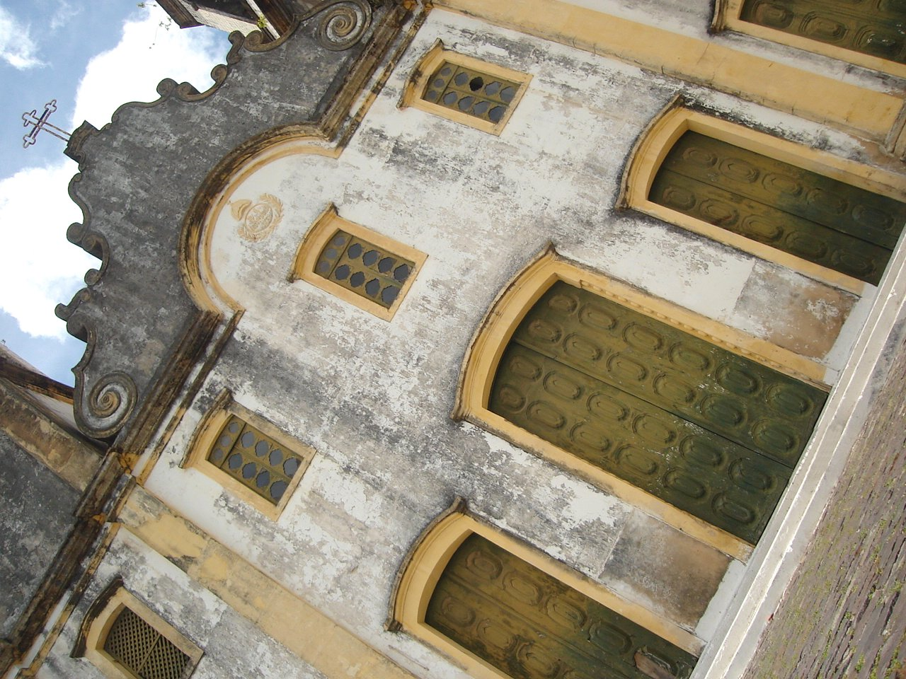 Igreja de São Cristóvão, Sergipe, Brasil.